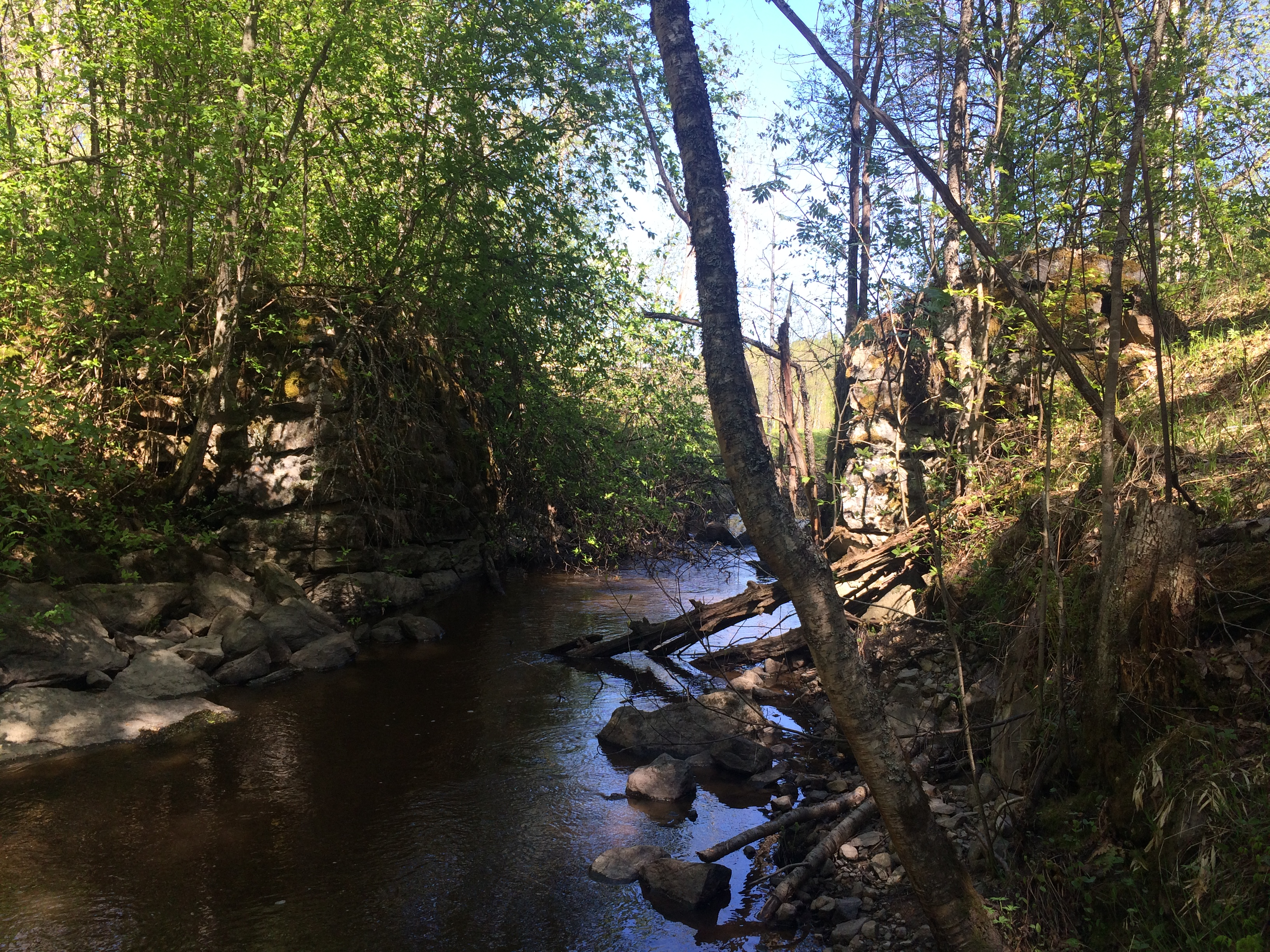 р. Титон-канава